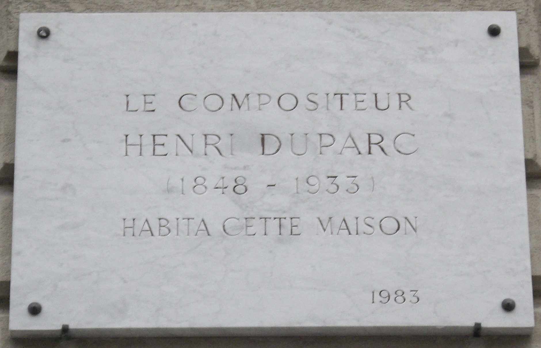 Plaque commémorative, 7 avenue de Villars, Paris 7e. « Le compositeur Henri Duparc, 1848-1933, habita cette maison. »